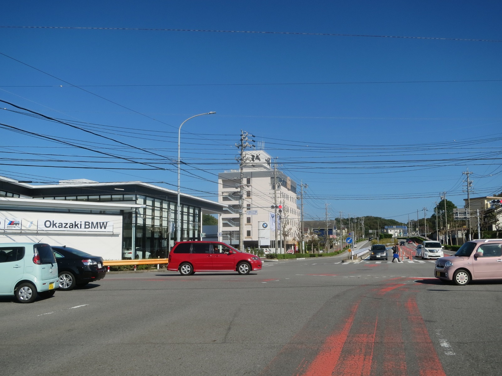 愛知県道26号岡崎環状線（起点の上地3丁目交差点）